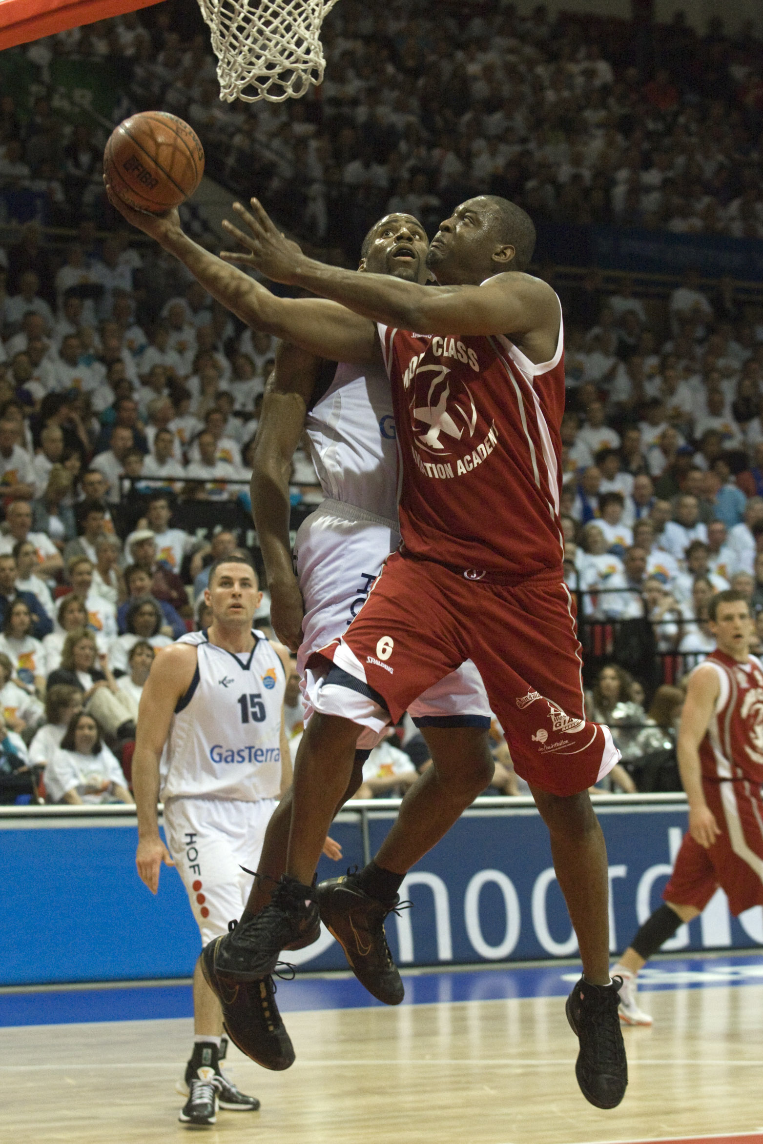 150510 GRONINGEN - opdrachtfoto - De GasTerra Flames (witte shirts) hebben zaterdagavond de eerste wedstrijd in de finale van de play-offs tegen de West Brabant Giants uit Bergen op Zoom met 89-65 gewonnen.